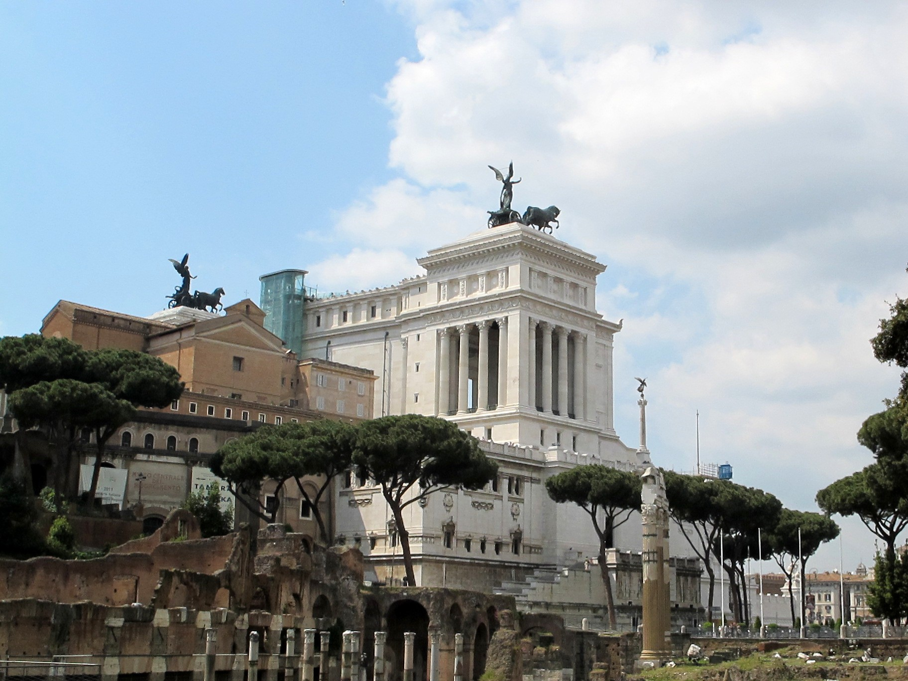 Il Vittoriano dai Fori Imperiali